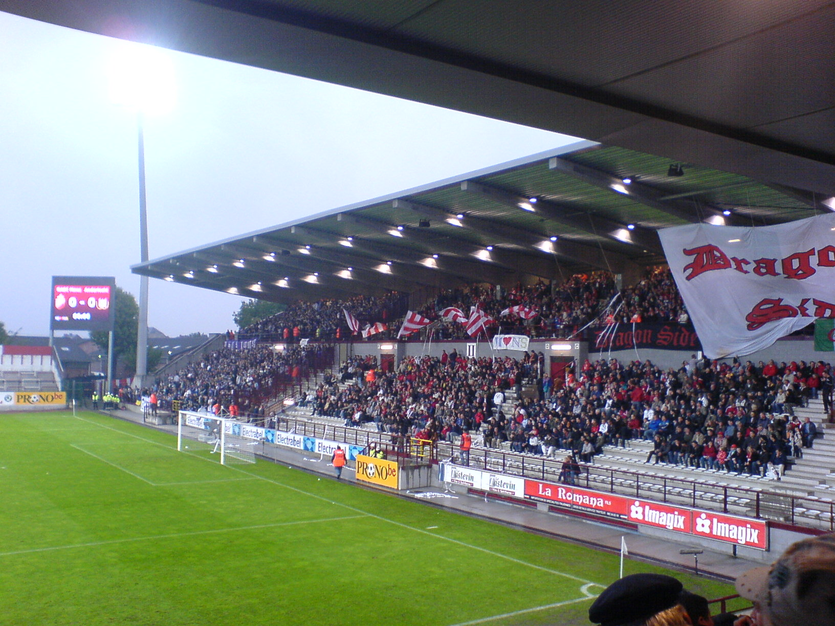 Match Mons - Anderlecht en septembre 2008.